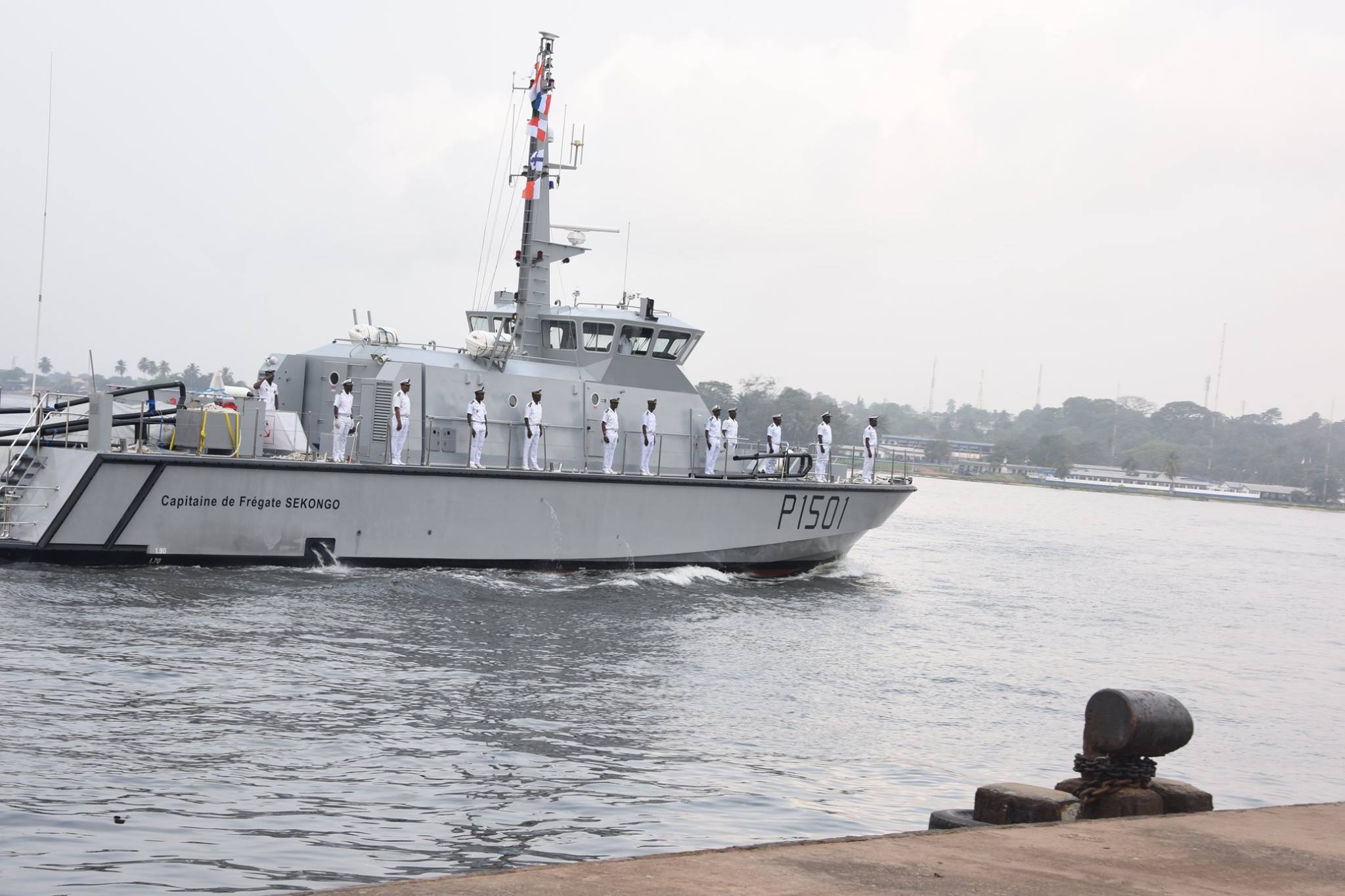 Tombés sur le champ d`honneur lors de la sécurisation de la baie lagunaire d`Abidjan le capitaine de frégate Sékongo Doulaye a été inhumé e vendredi 5 octobre, au cimetière municipal de Wiliasmville devant un parterre d’autorités militaires, civiles et religieuses.